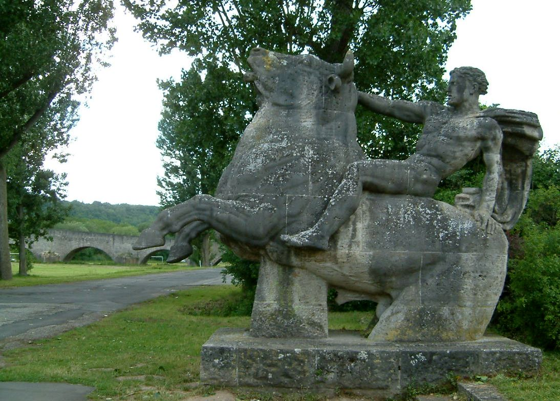 Willy Meller (Entwurf)/Wilhelm Ax (Bildhauer), Stierbändiger in Ochsenfurt